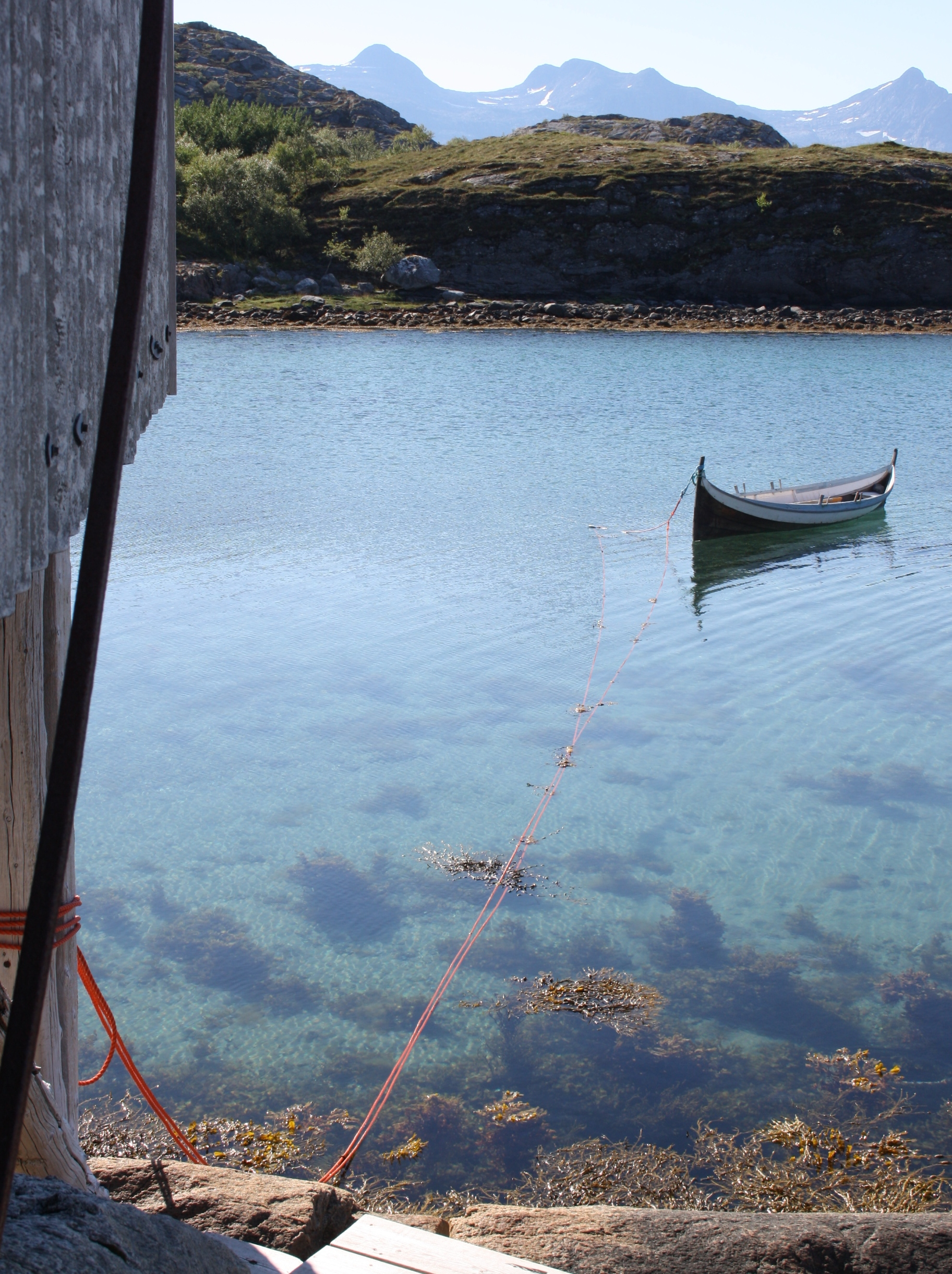 Bindalsfæring fortøydd på dragkale.